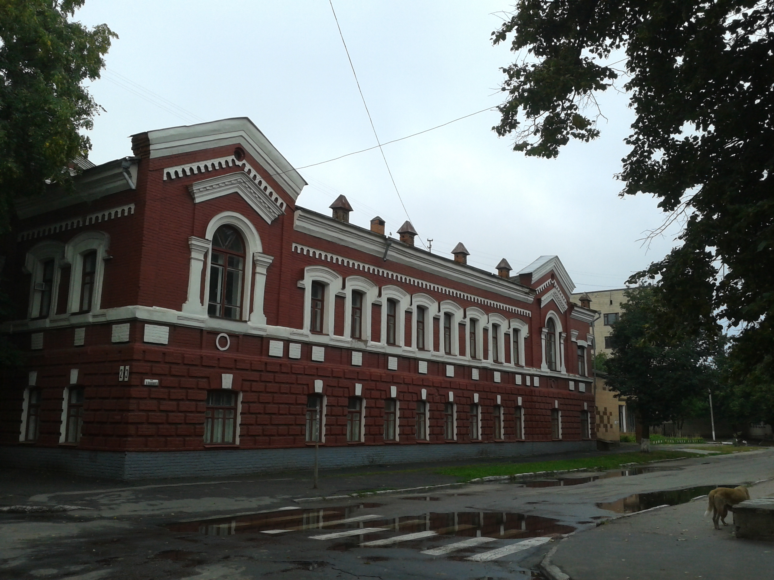 Духовне училище (Лубенський фінансово – економічний коледж Полтавської державної аграрної академії)